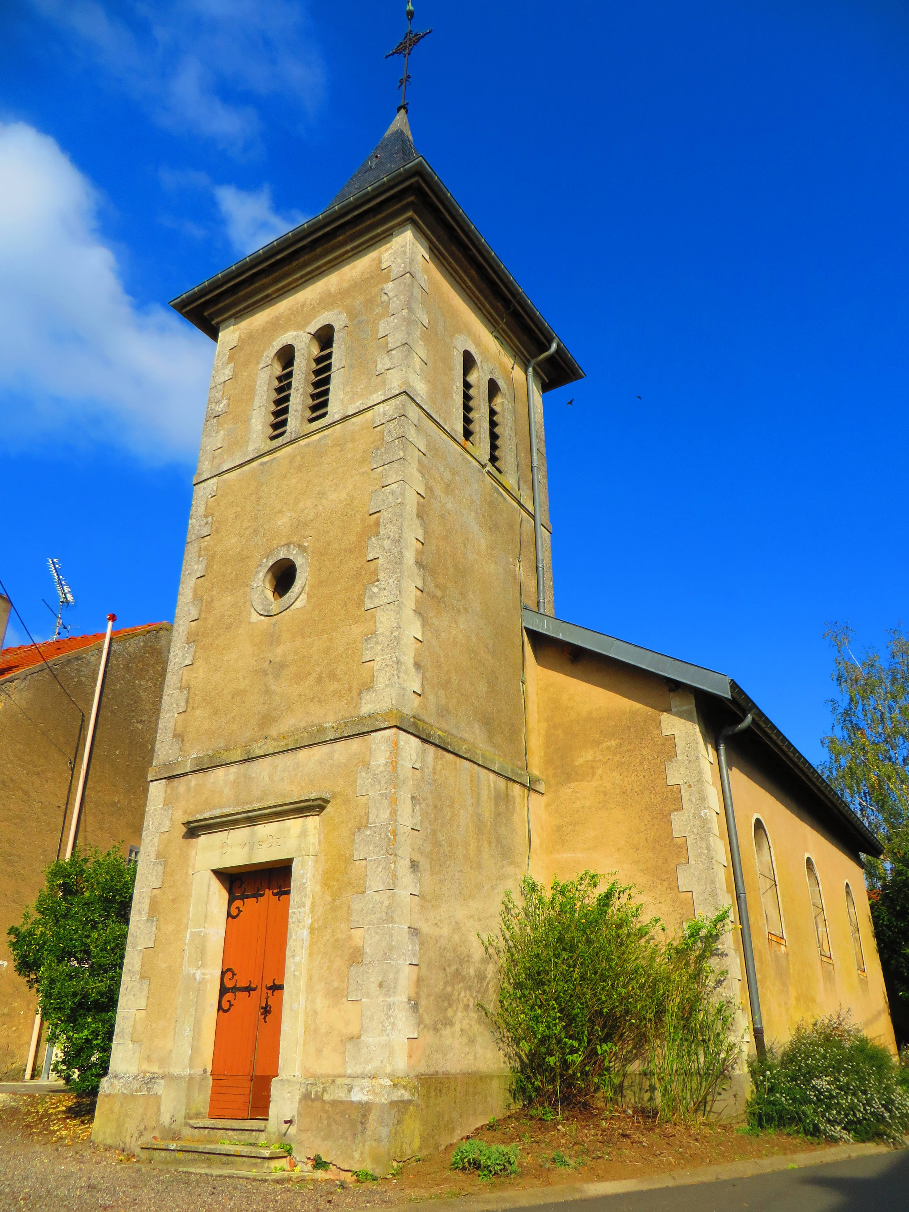 Aboncourt-sur-Seille l'église Saint-Pierre